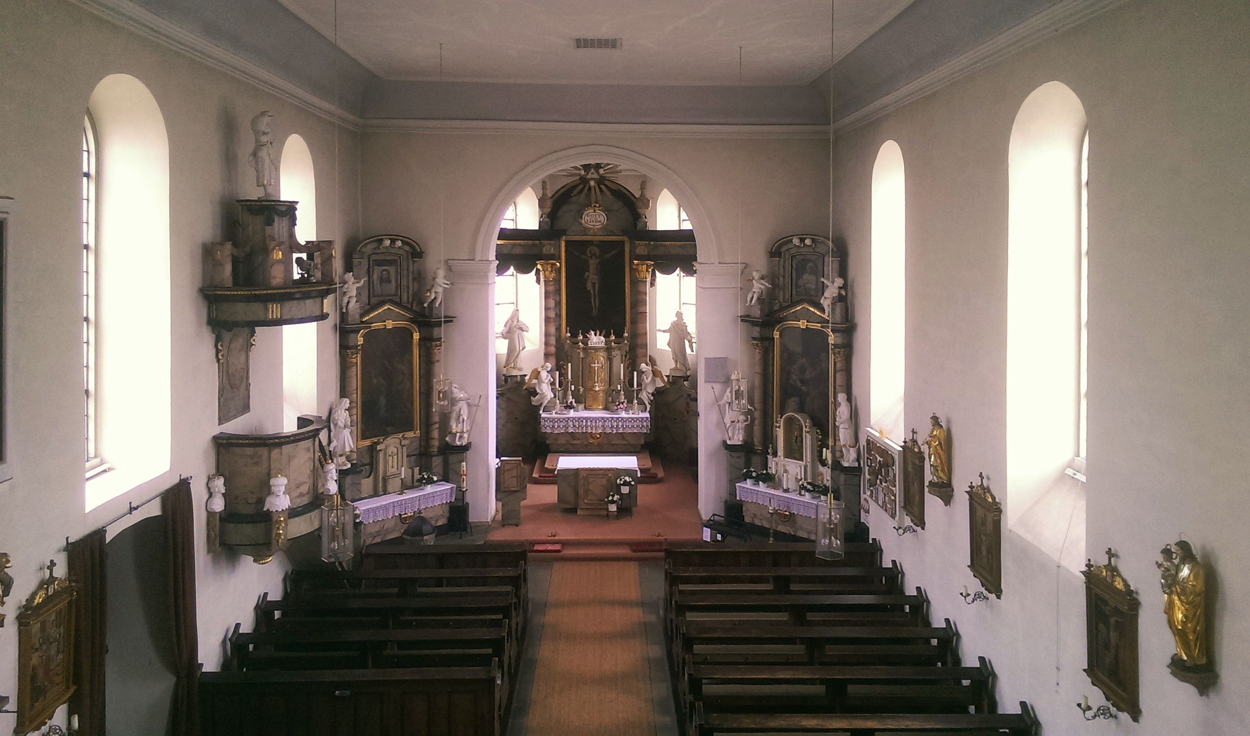 Kirche "Mariä Geburt" in Windheim: Blick von der Empore